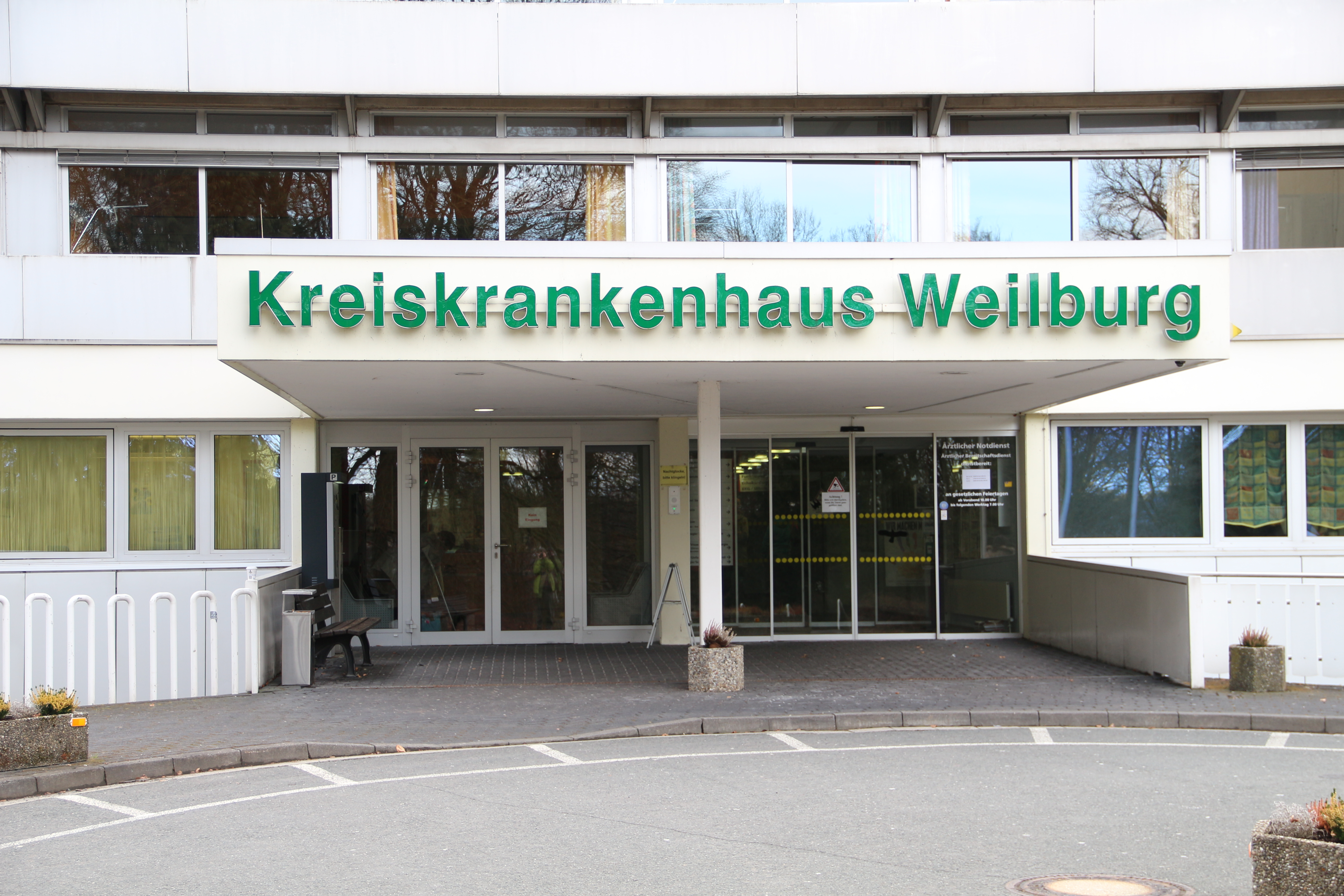 Weilburg